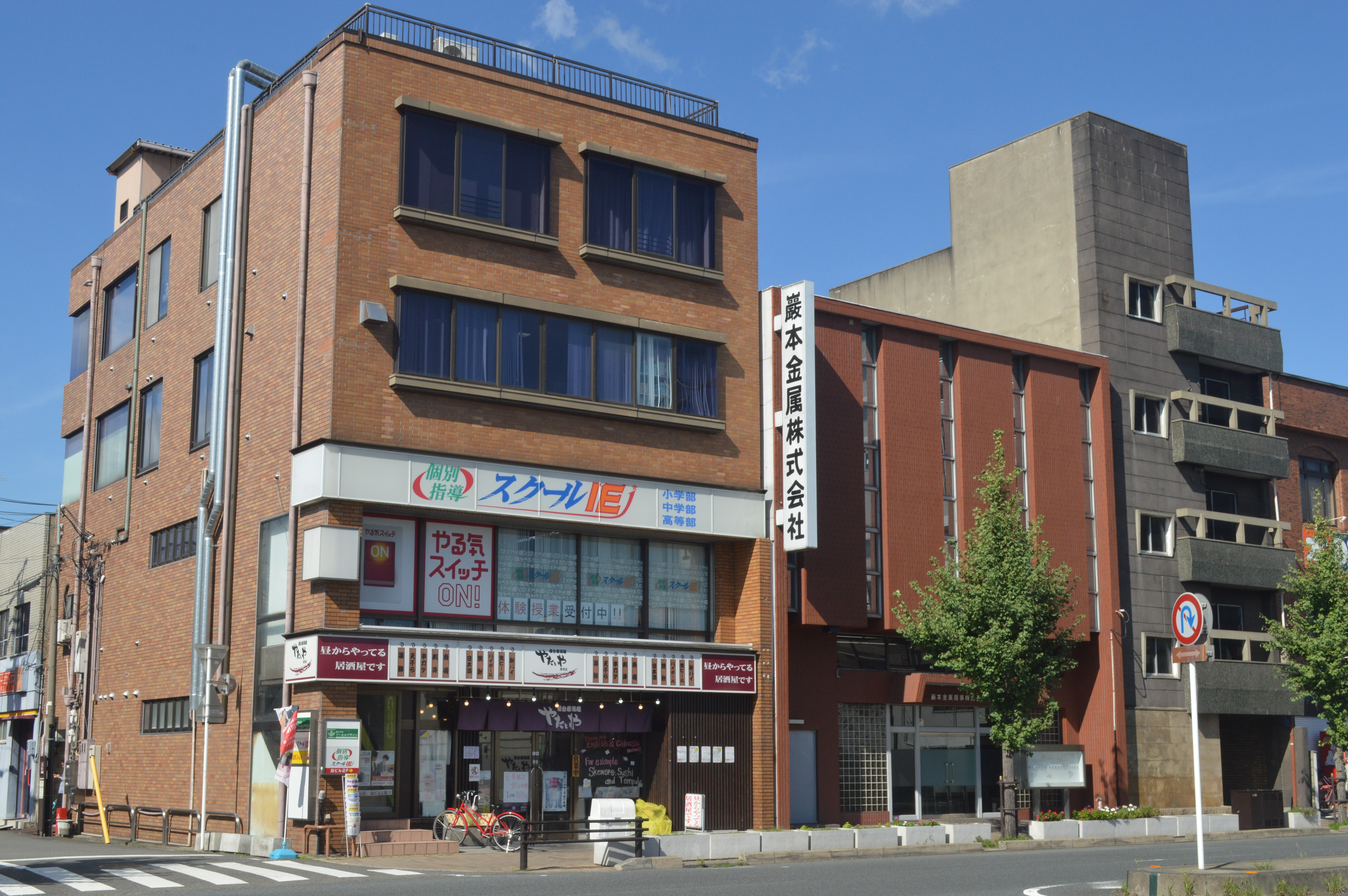 京都府京都市南区にある巖本金属株式会社（中央右の焦げ茶色の建物）。